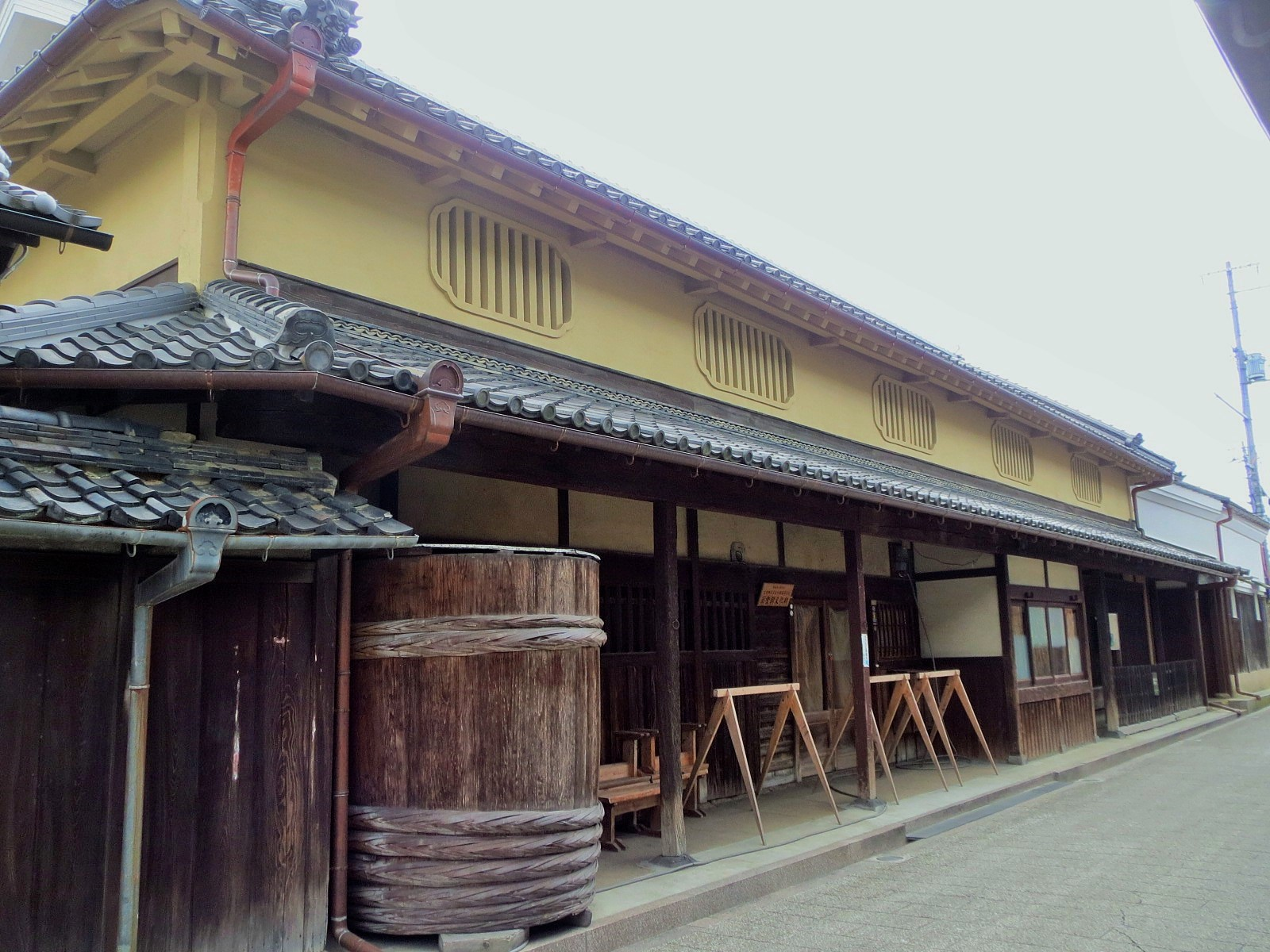 登録有形文化財である西條旧店舗